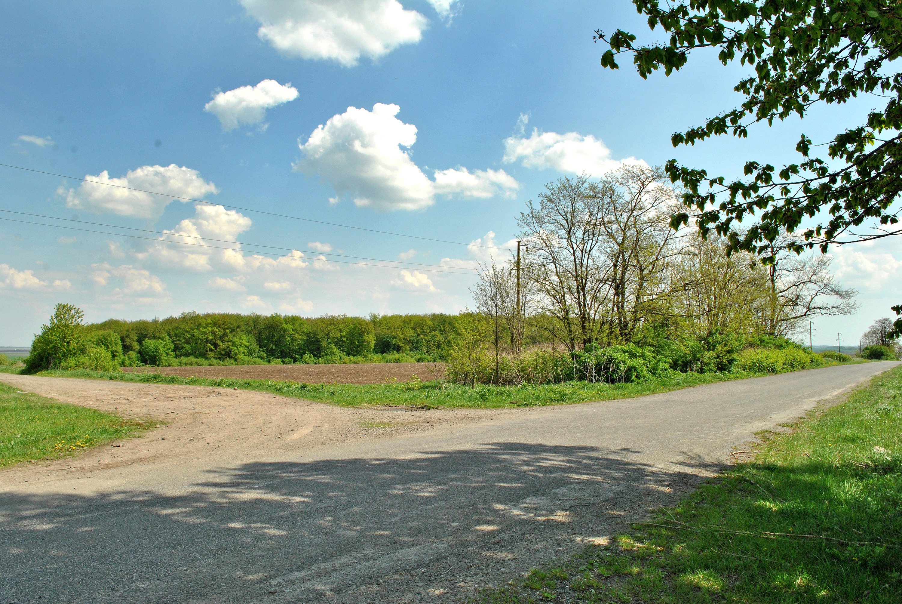 Роздоріжжя на місці колишнього села Кадуби (нині Бучацький район Тернопільської області). Ліворуч — до села Пожежа, прямо — до села Поділля (Заліщицького району.)